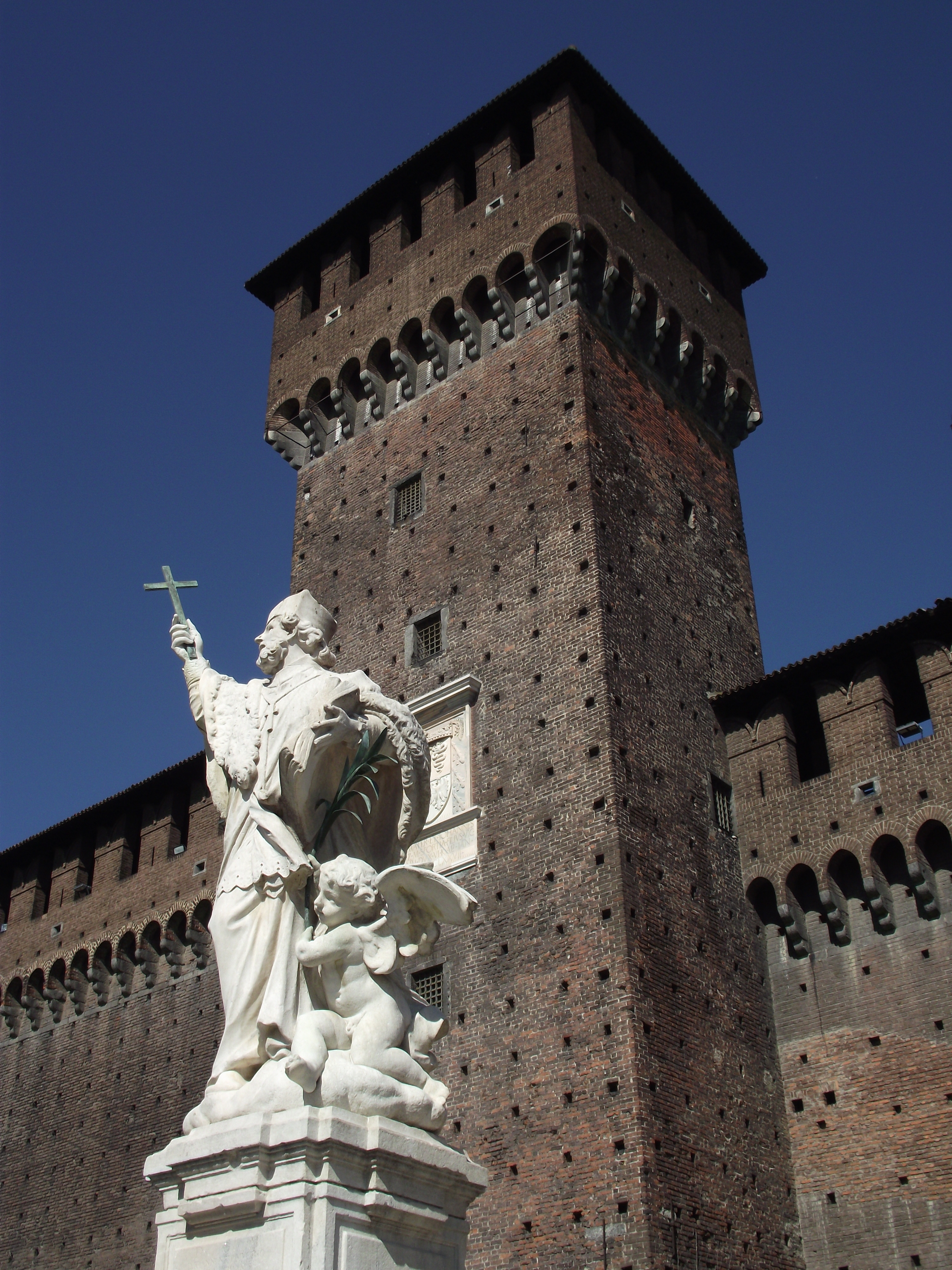 Torre di Bona di Savoia e statua di S. Giovanni Nepomuceno